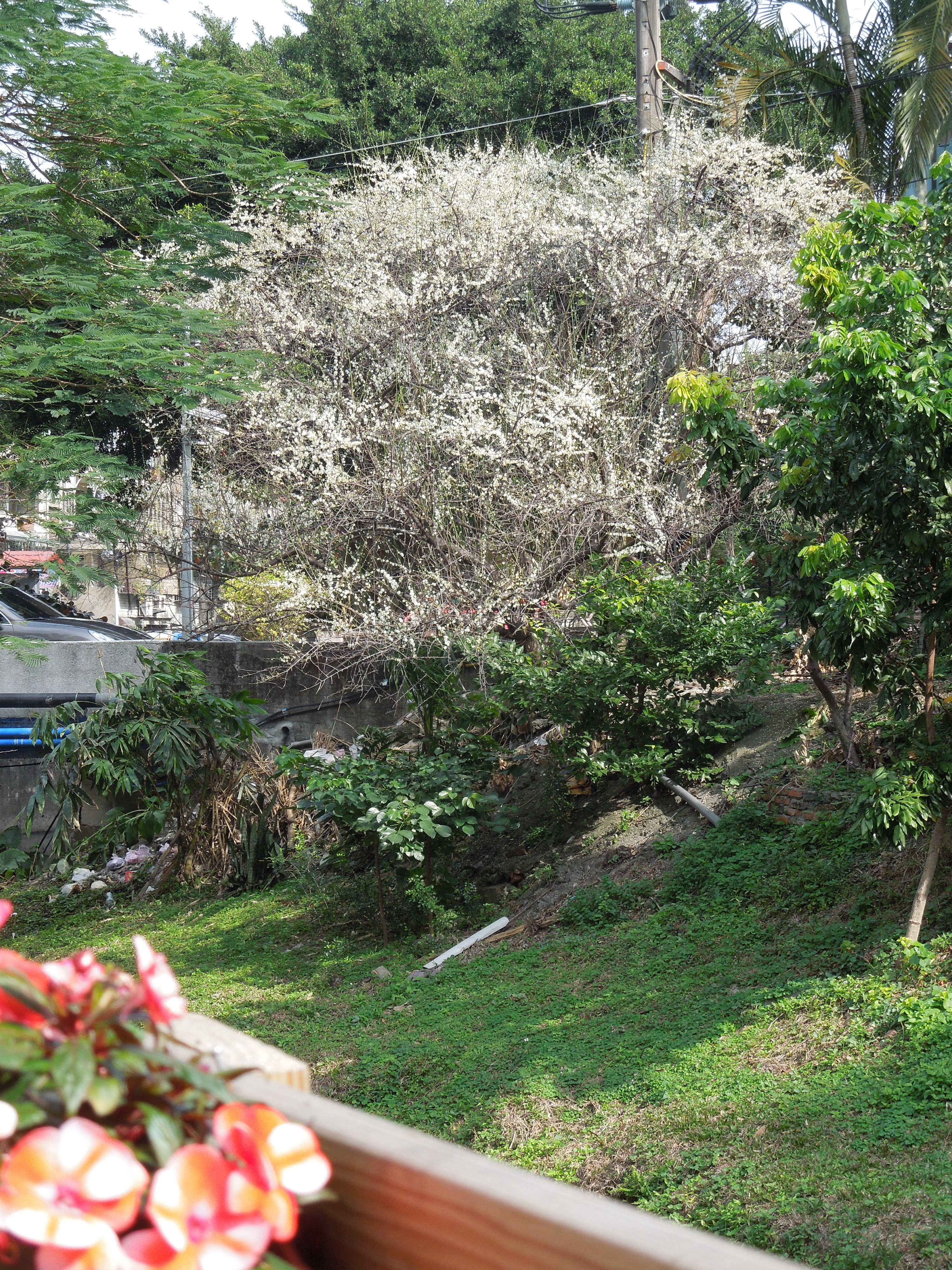 從智光里的綠化空地看瓦磘溝嘉新福橋旁梅花盛開